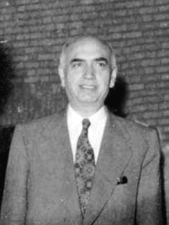 عکس شخصی